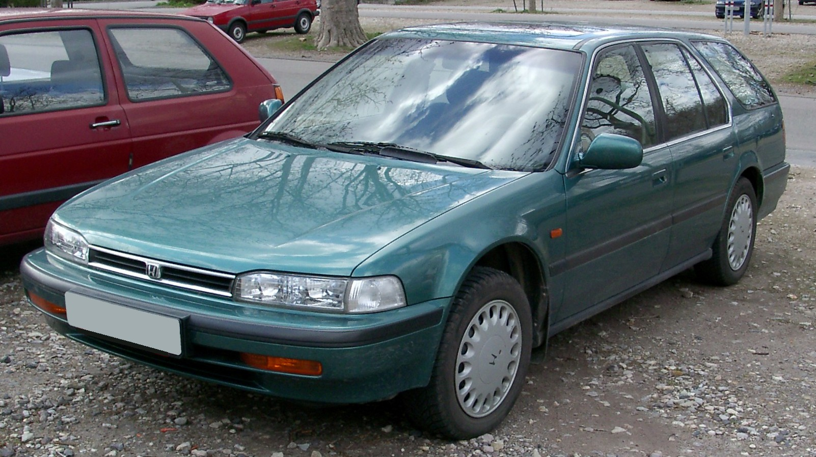 Honda Accord Kombi, 4. Generation